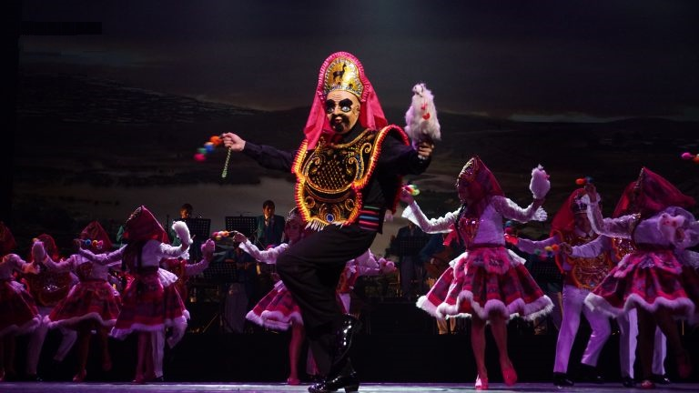 El qañiachu, quien simboliza al macho dominante en el grupo de llamas, dirige a la agrupación en la coreografía elegante y disciplinada